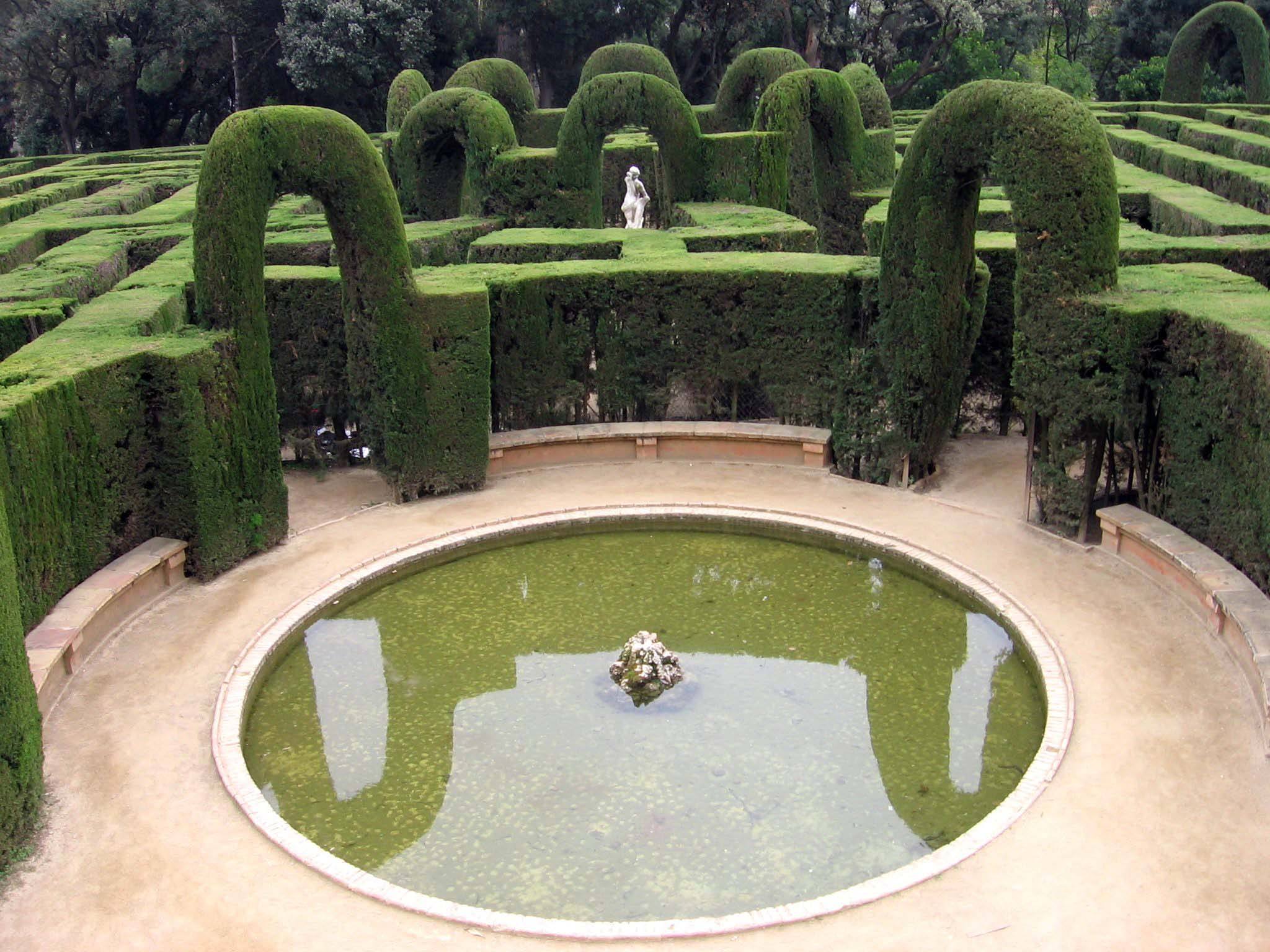 Laberinto de Horta (Barcelona).